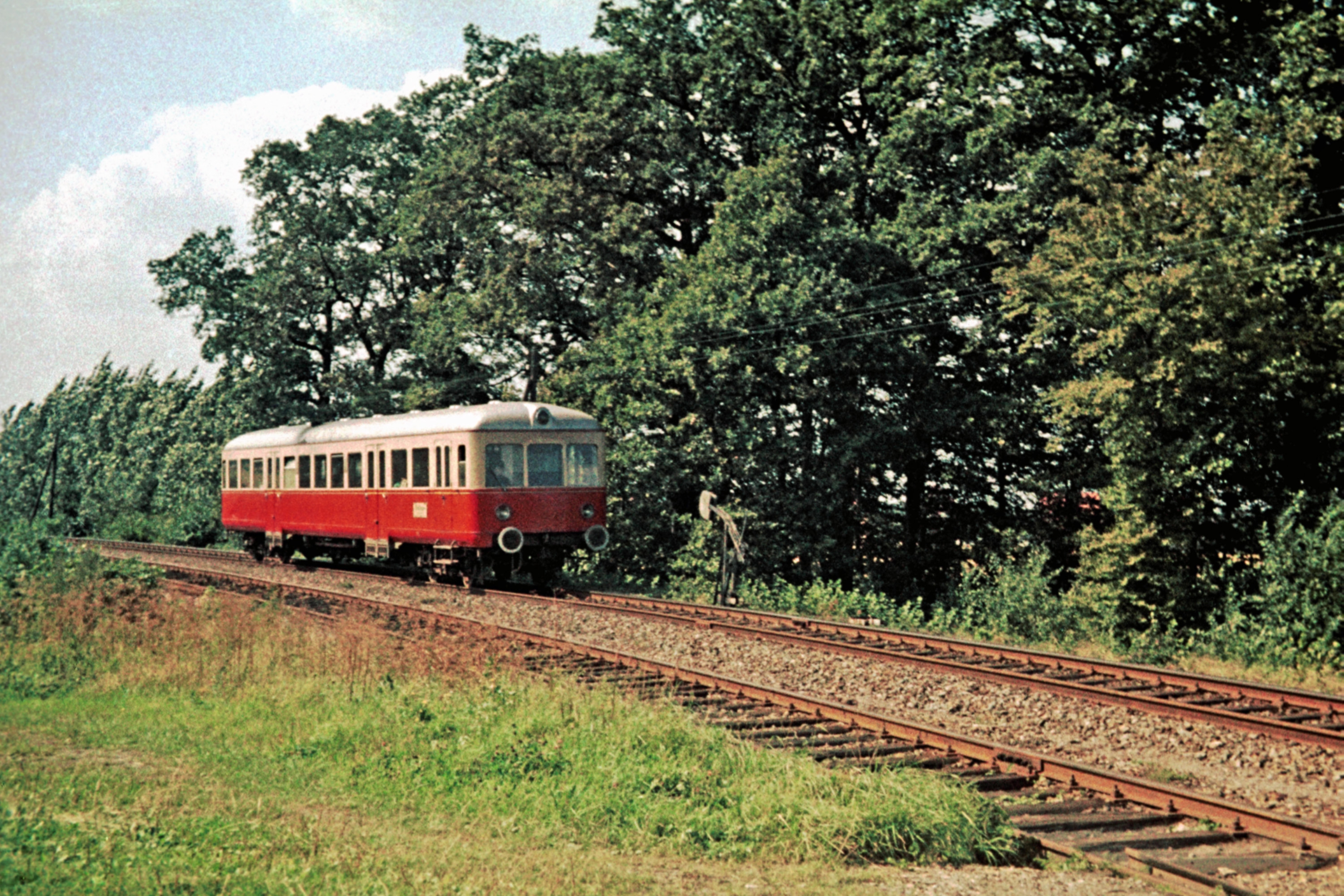 Triebwagen VT 61 der Rinteln-Stadthagener Eisenbahn (RStE)